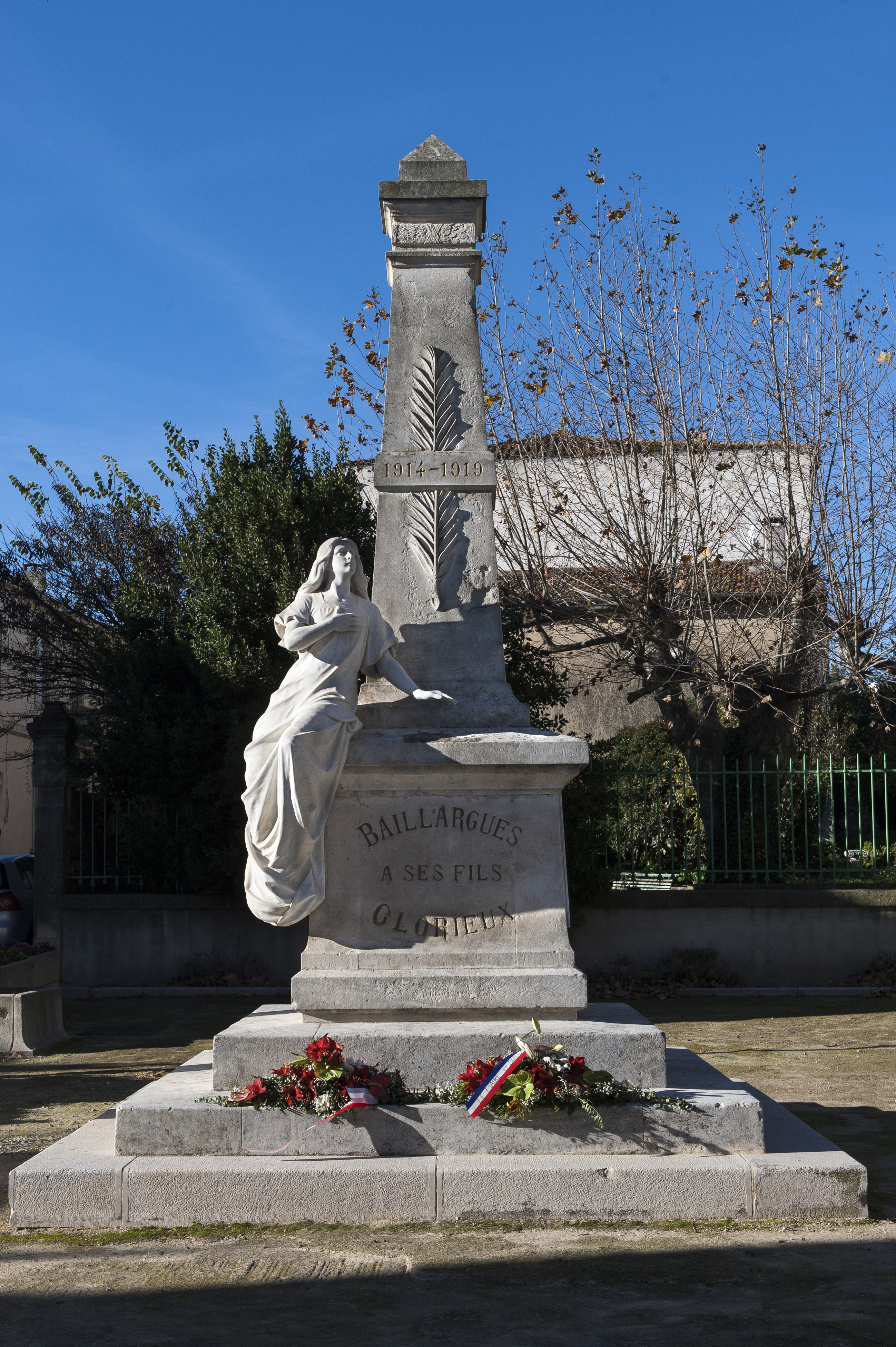 Monument aux morts Baillargues Canton du Crès